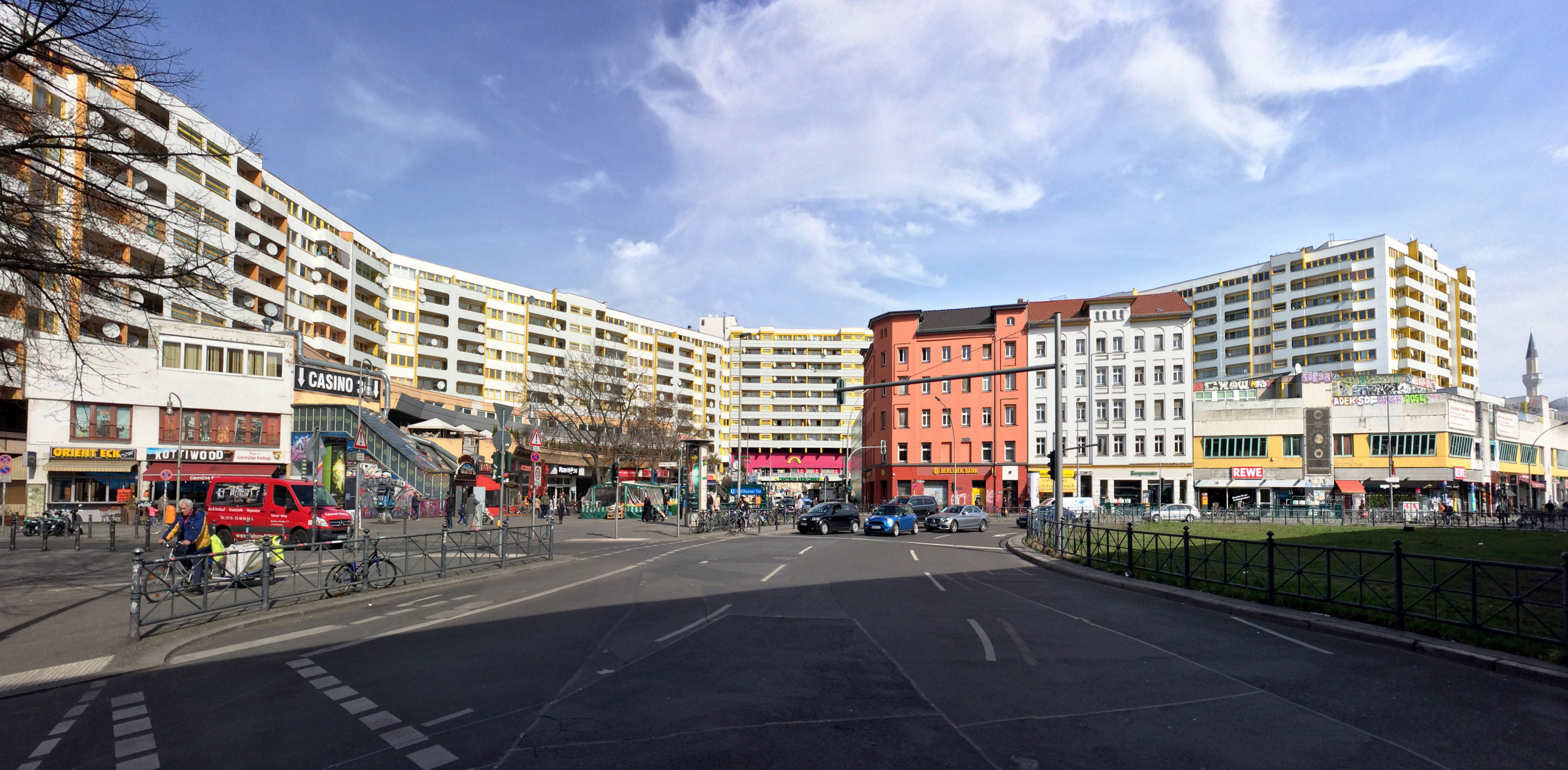 Hochhauszeile Neues Kreuzberger Zentrum, Kottbusser Tor, Berlin-Kreuzberg, 1969–1974, Wolfgang Jokisch und Johannes Uhl